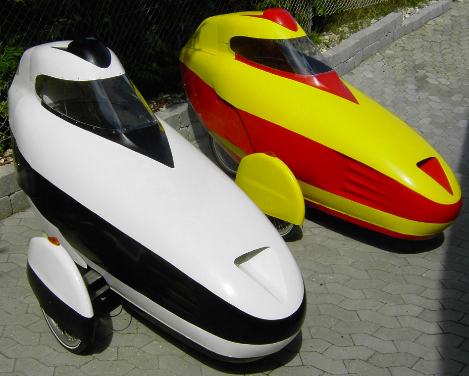 2 Leitraer der i dag kører i New Zealand.